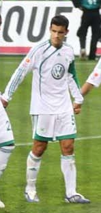 Ricardo Costa